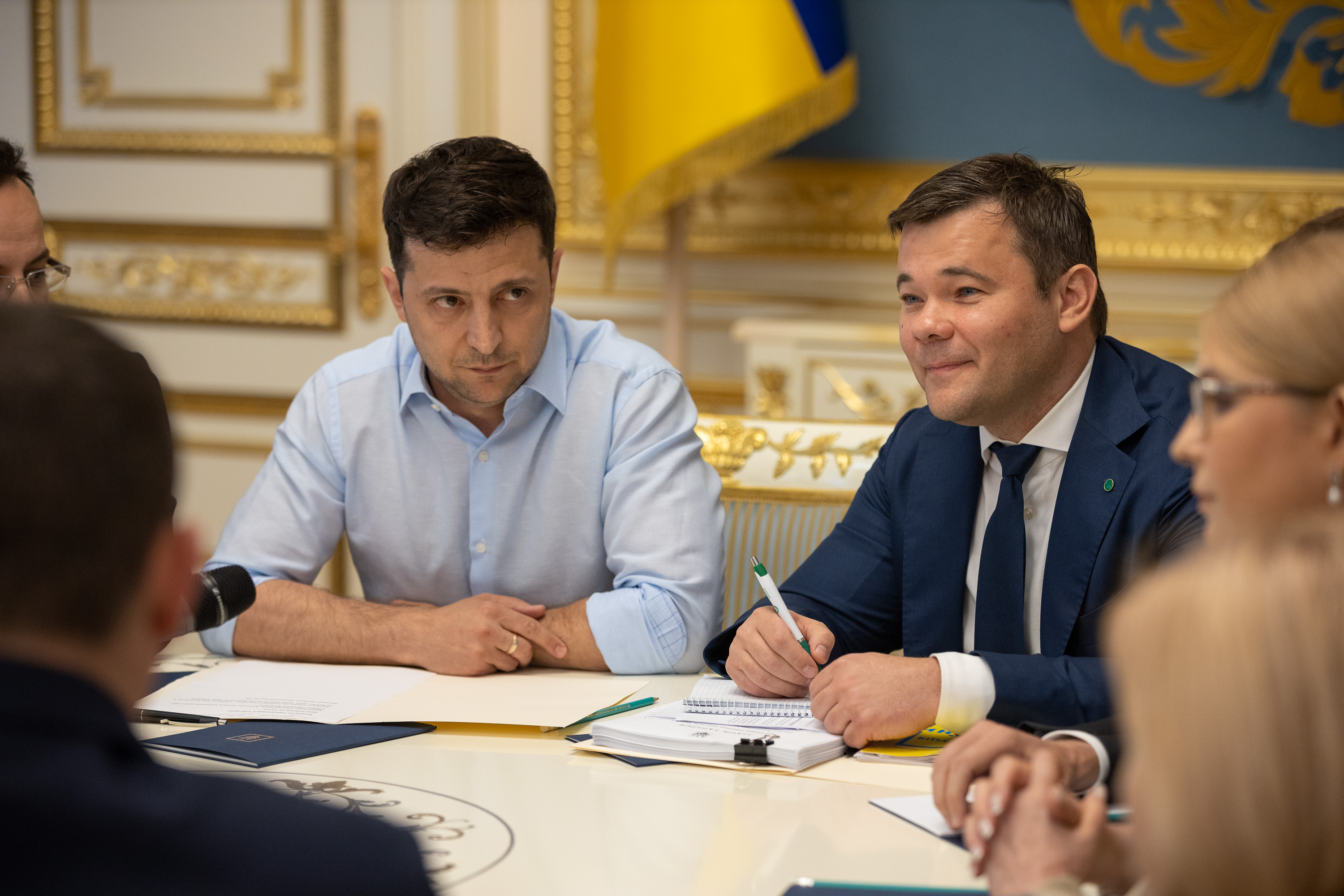 Встреча Зеленского с руководством ВРУ